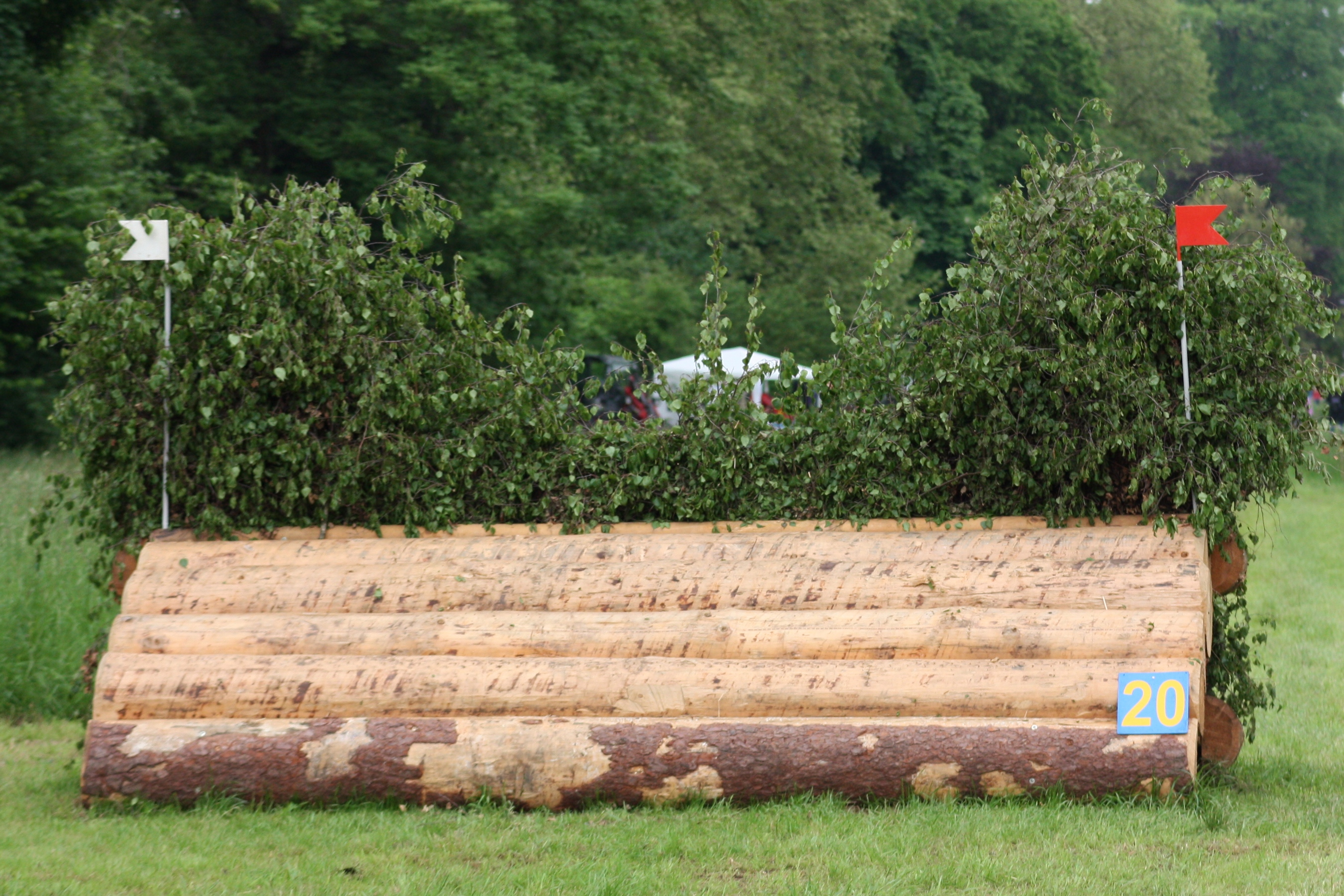 77. Internationales Pfingstturnier Wiesbaden 2013, CIC *** Vielseitigkeit Geländeprüfung, Geländehindernis The making of this document was supported by the Community-Budget of Wikimedia Germany.